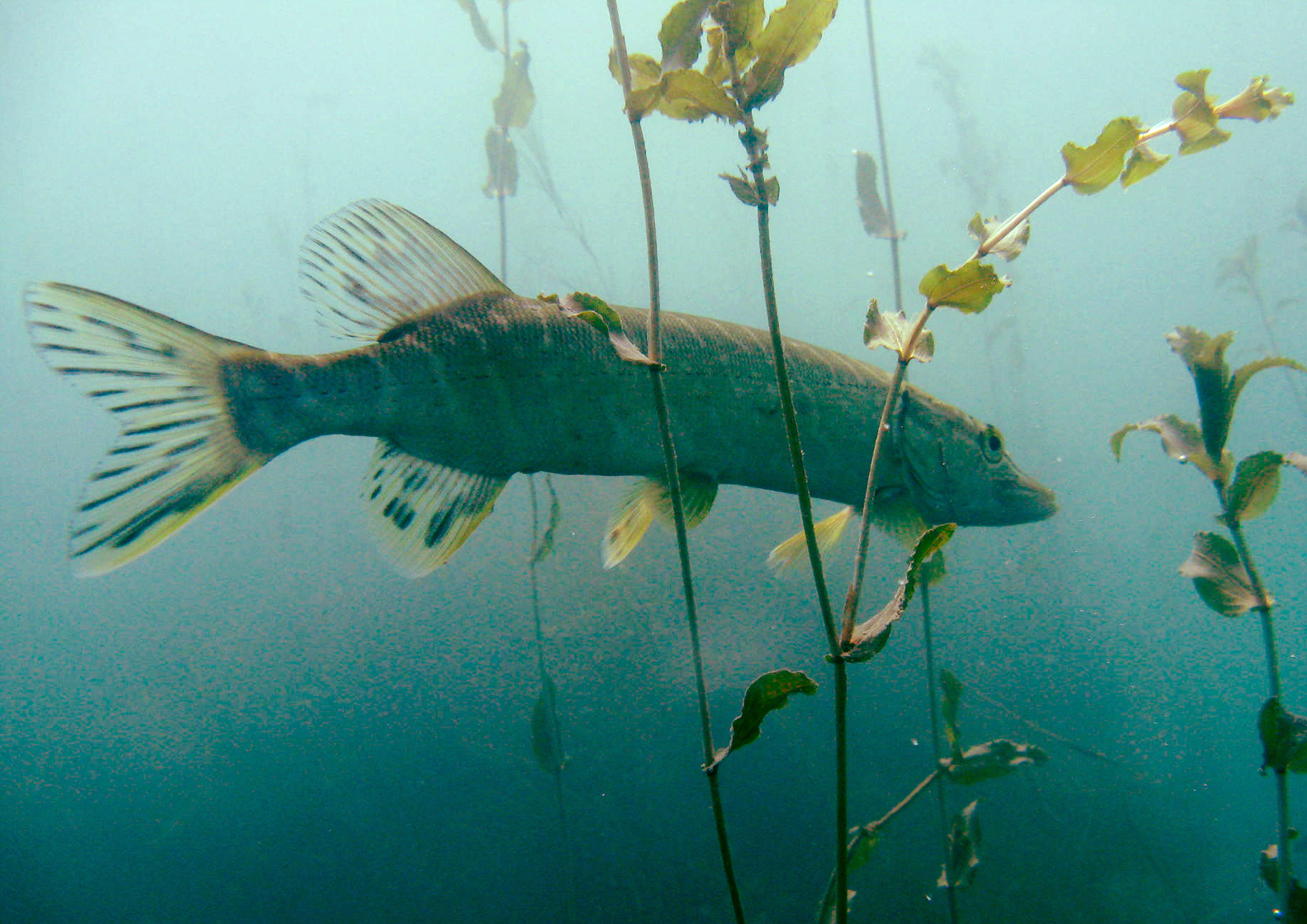 Brochet dans une gravière alsacienne